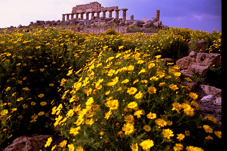 primavera